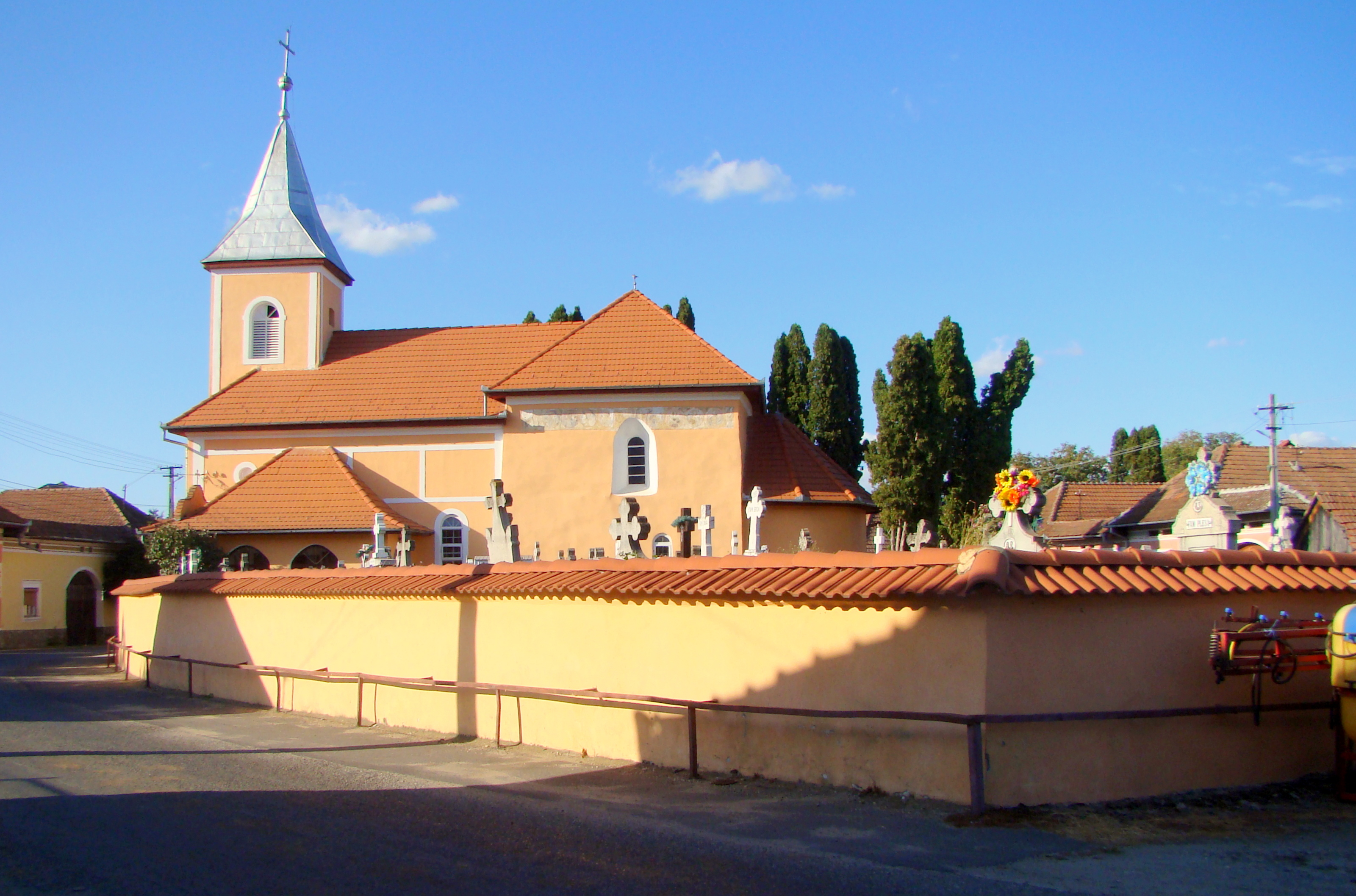 Biserica „Adormirea Maicii Domnului”, sat Voivodeni; comuna Voila 46 sec. XIII-XX